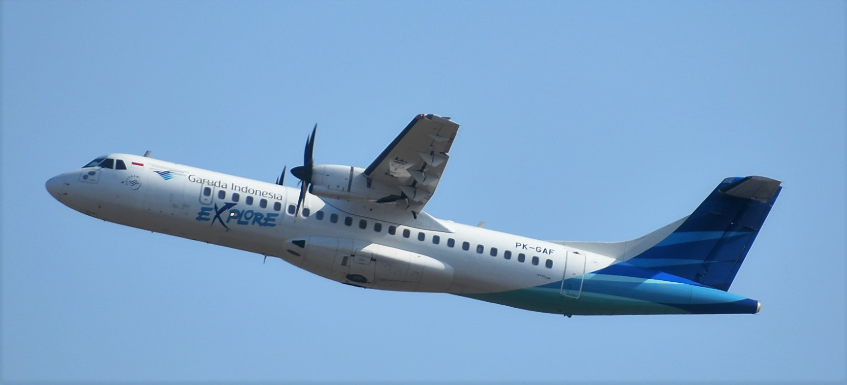 Aerospatiale ATR72/6 of Garuda Indonesia Explore departing rwy.10 at Surabaya-SUB, Indonesia, 10/09/17.